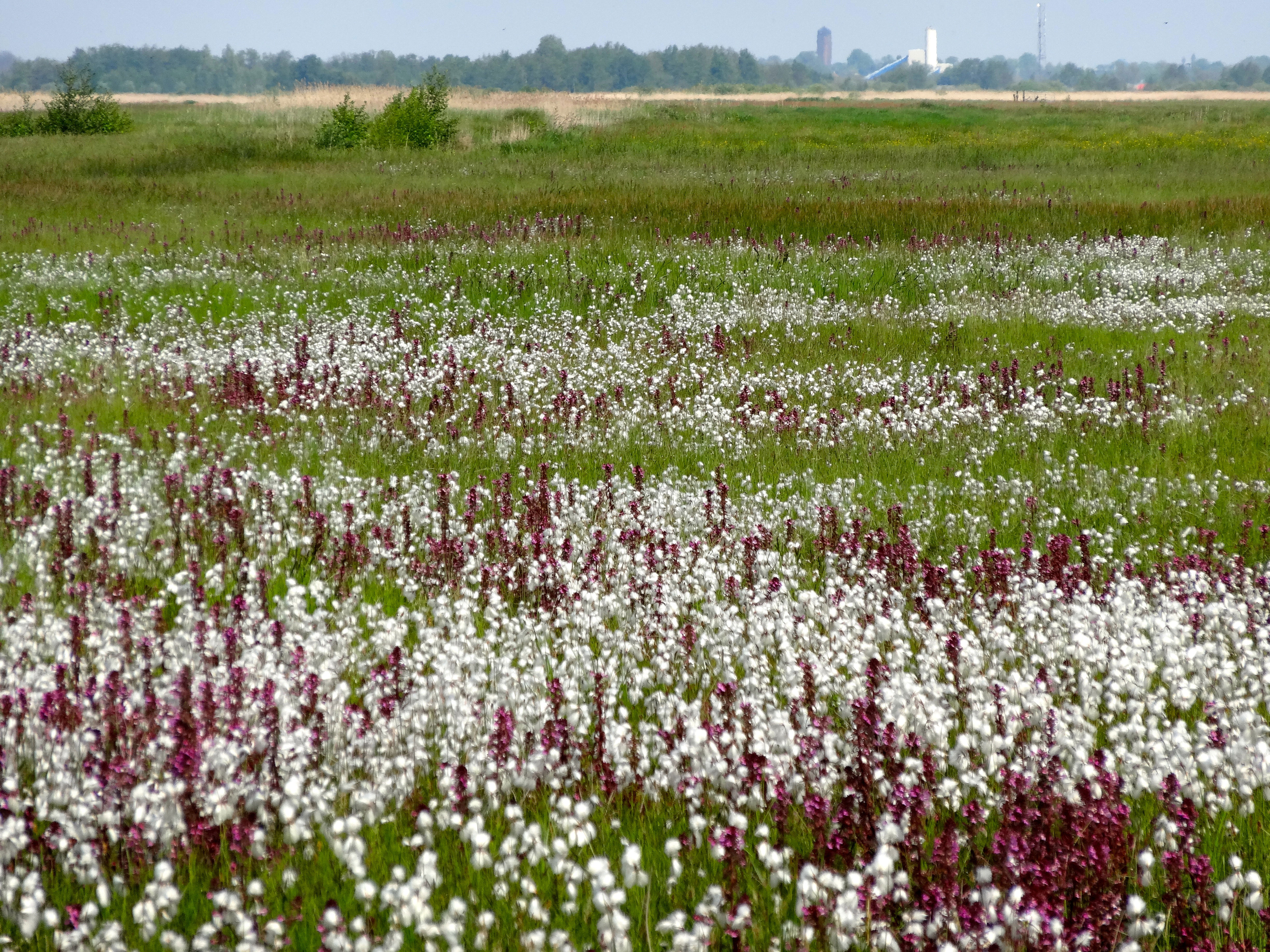 De Wieden gezien vanaf de Bramen, ten oosten van Giethoorn